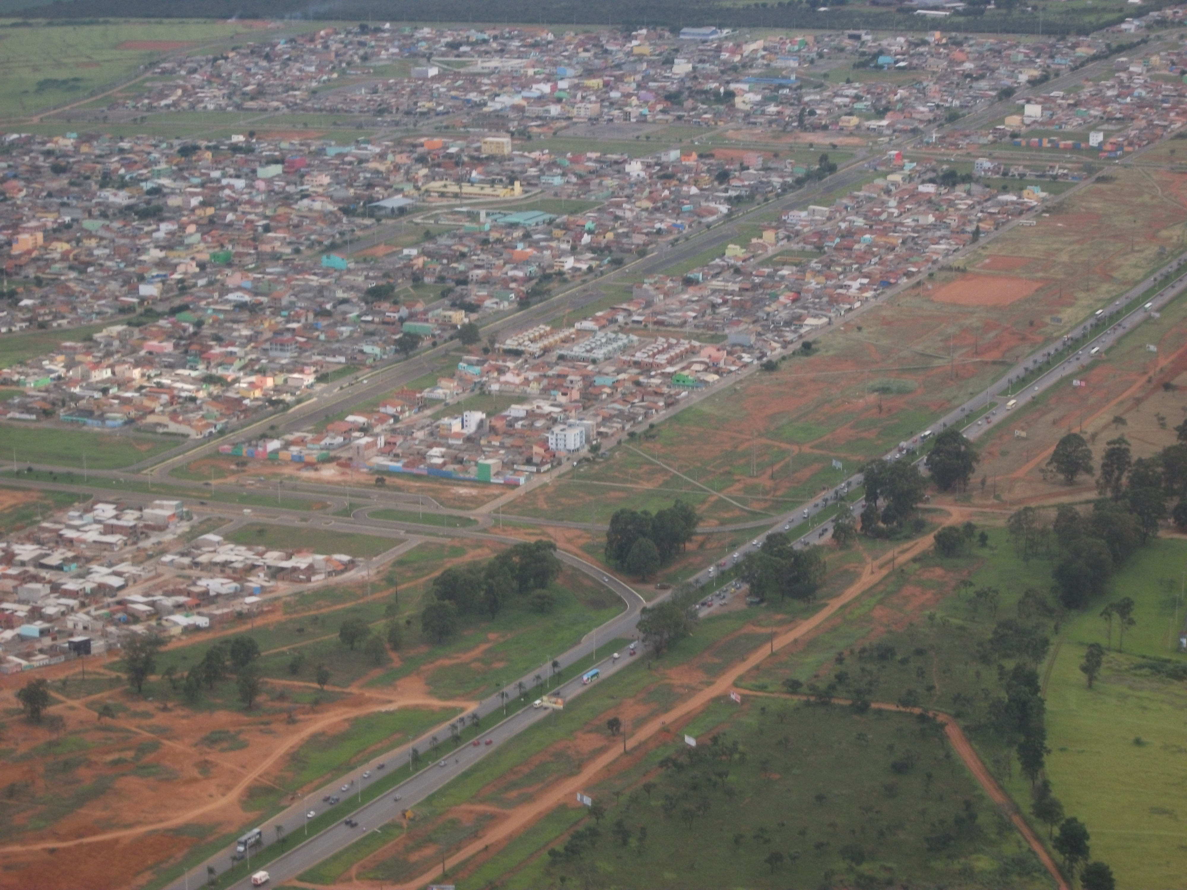 Vista parcial de Riacho Fundo II - DF.